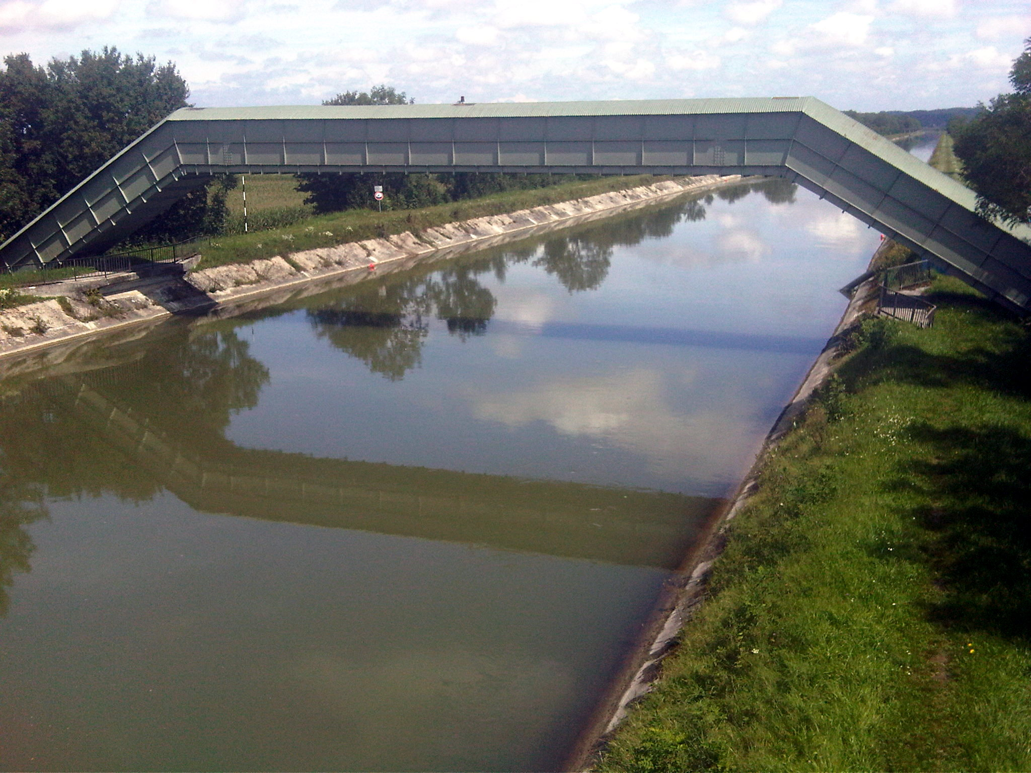 Überquerung des Isarkanals bei Berglern, Oberbayern